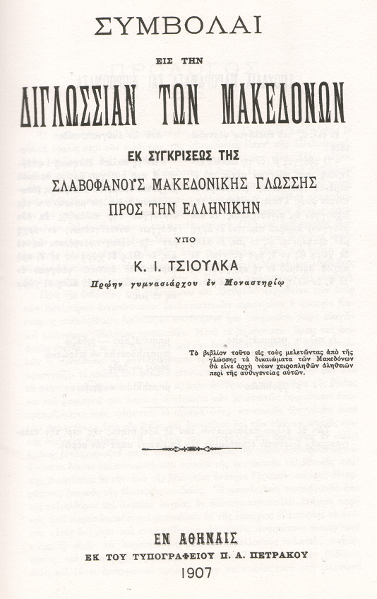 Συμβολαί εις την διγλωσσίαν των Μακεδόνων εκ συγκρίσεως της σλαυοφανούς μακεδονικής γλώσσης προς την ελληνικήν / Υπό Κ. Ι. Τσιούλκα.